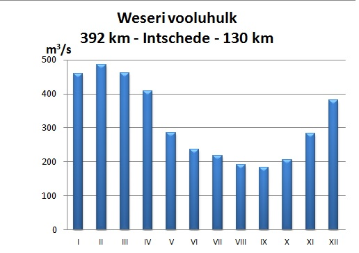 Weser river hudrohudrograaf